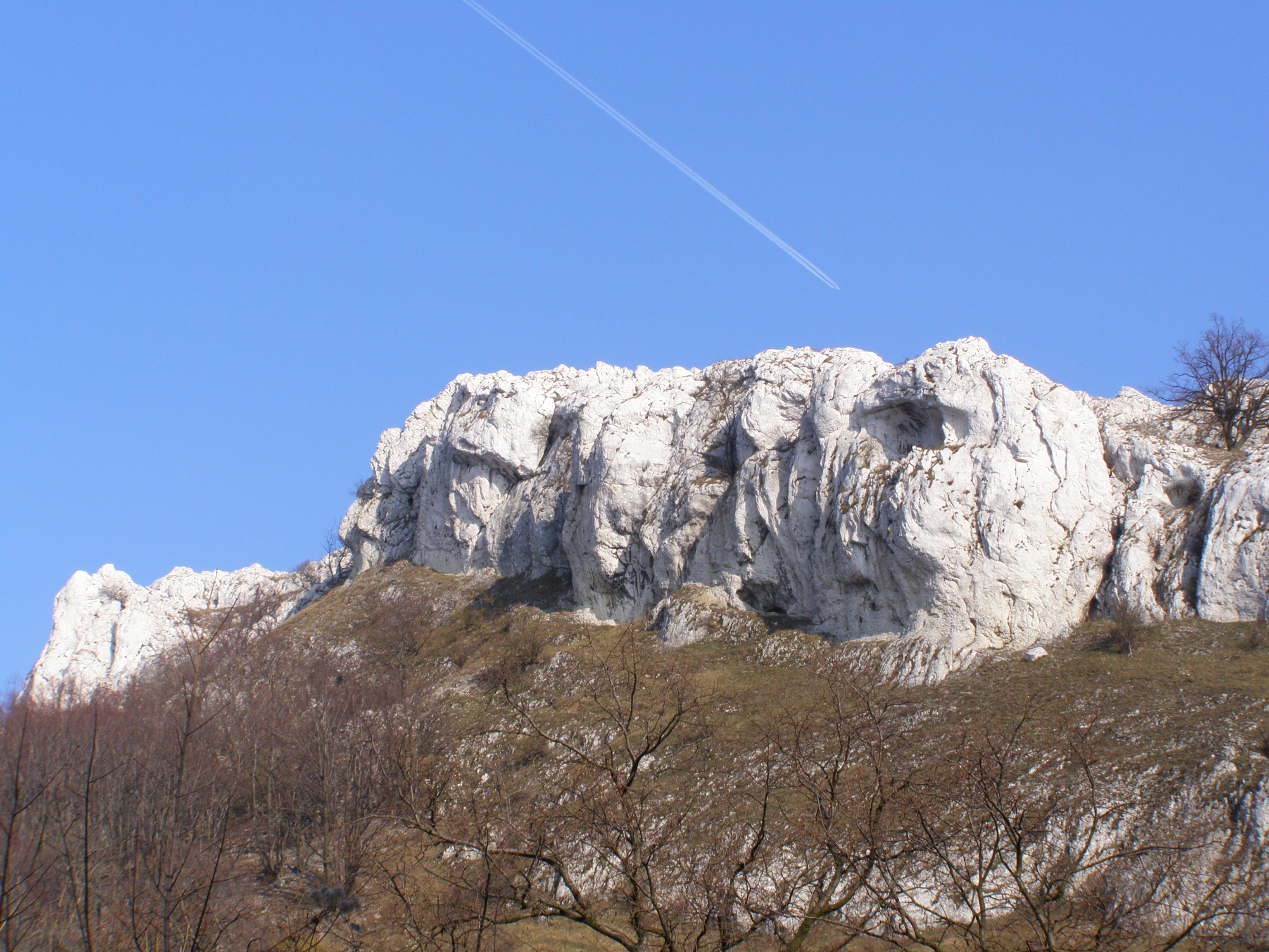 Pavlovské vrchy, Děvín (549m), pohled na západní skaliska